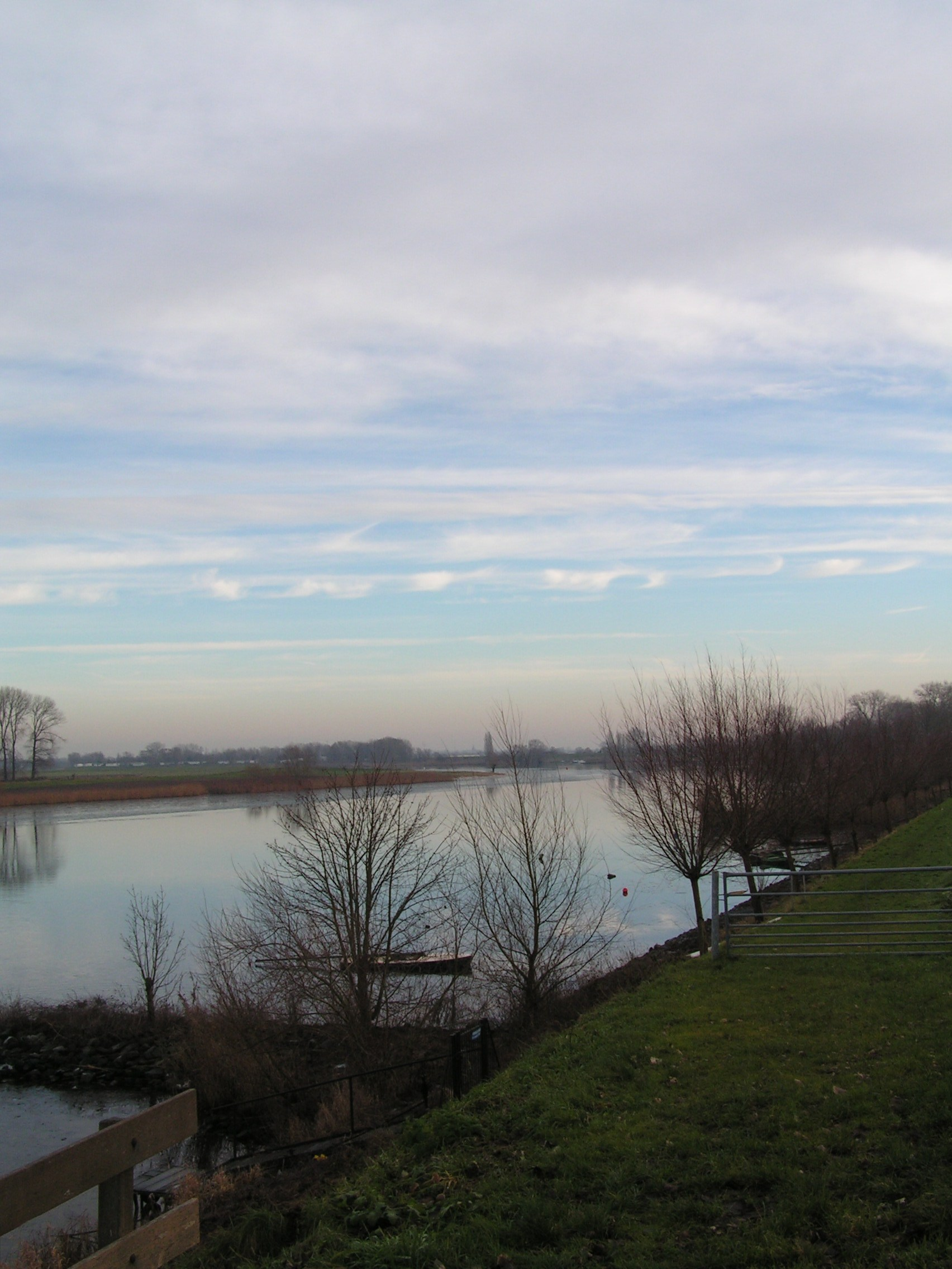 Uitzicht op de Afgedamde Maas vanaf de dijk in Andel